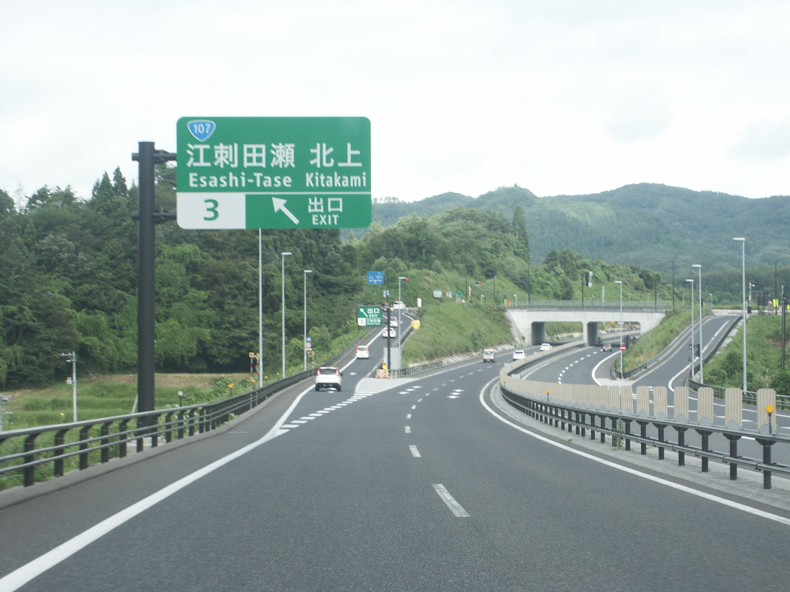 釜石自動車道江刺田瀬IC出口付近（遠野IC方面側から撮影）